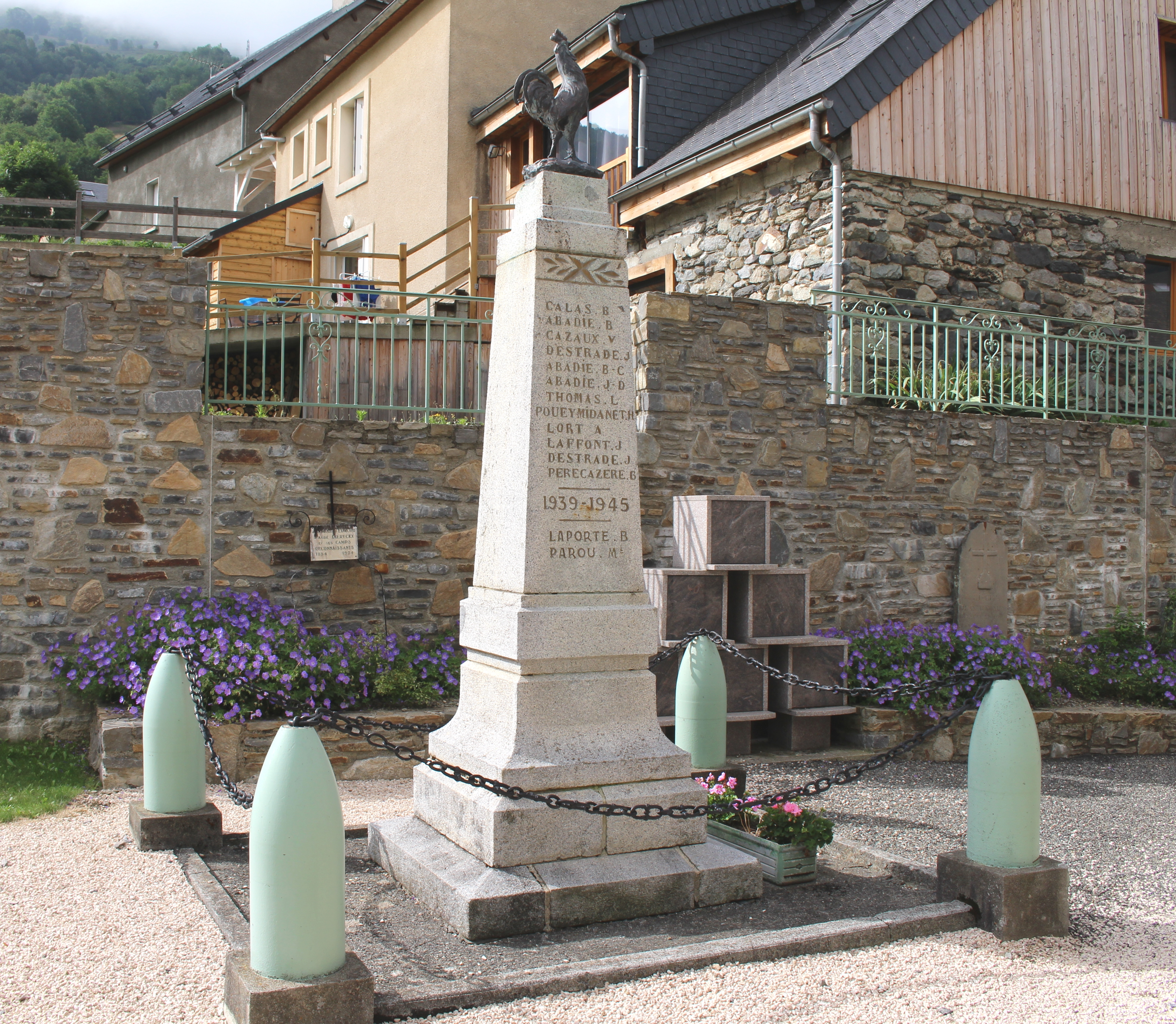 Monument aux morts de Betpouey (Hautes-Pyrénées)